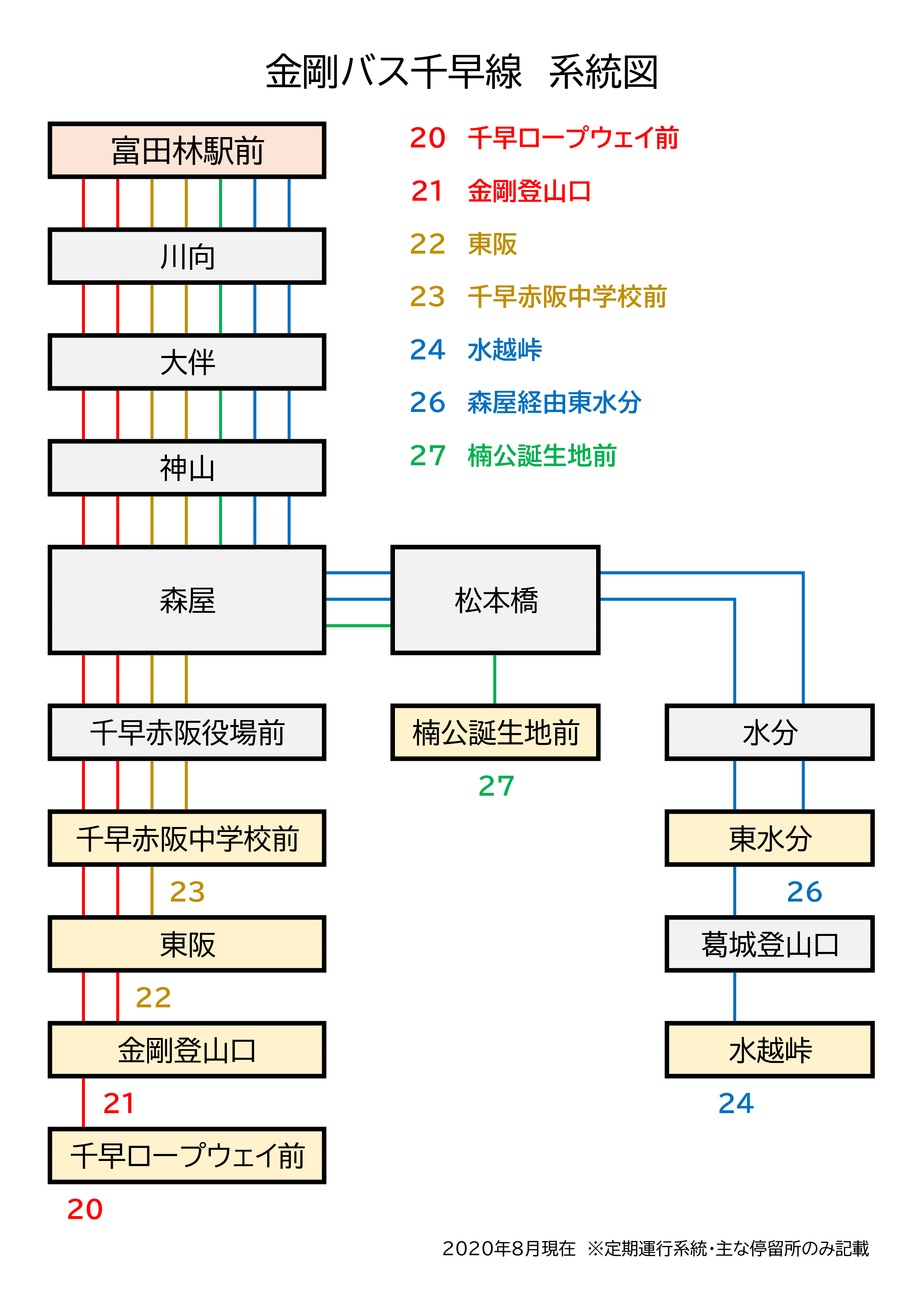 金剛バス千早線の路線系統図